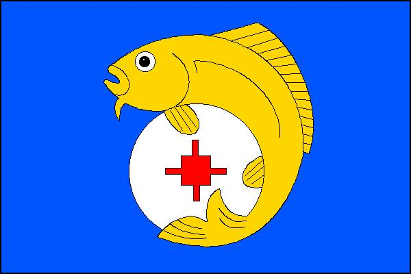 Vlajka obce Záříčí